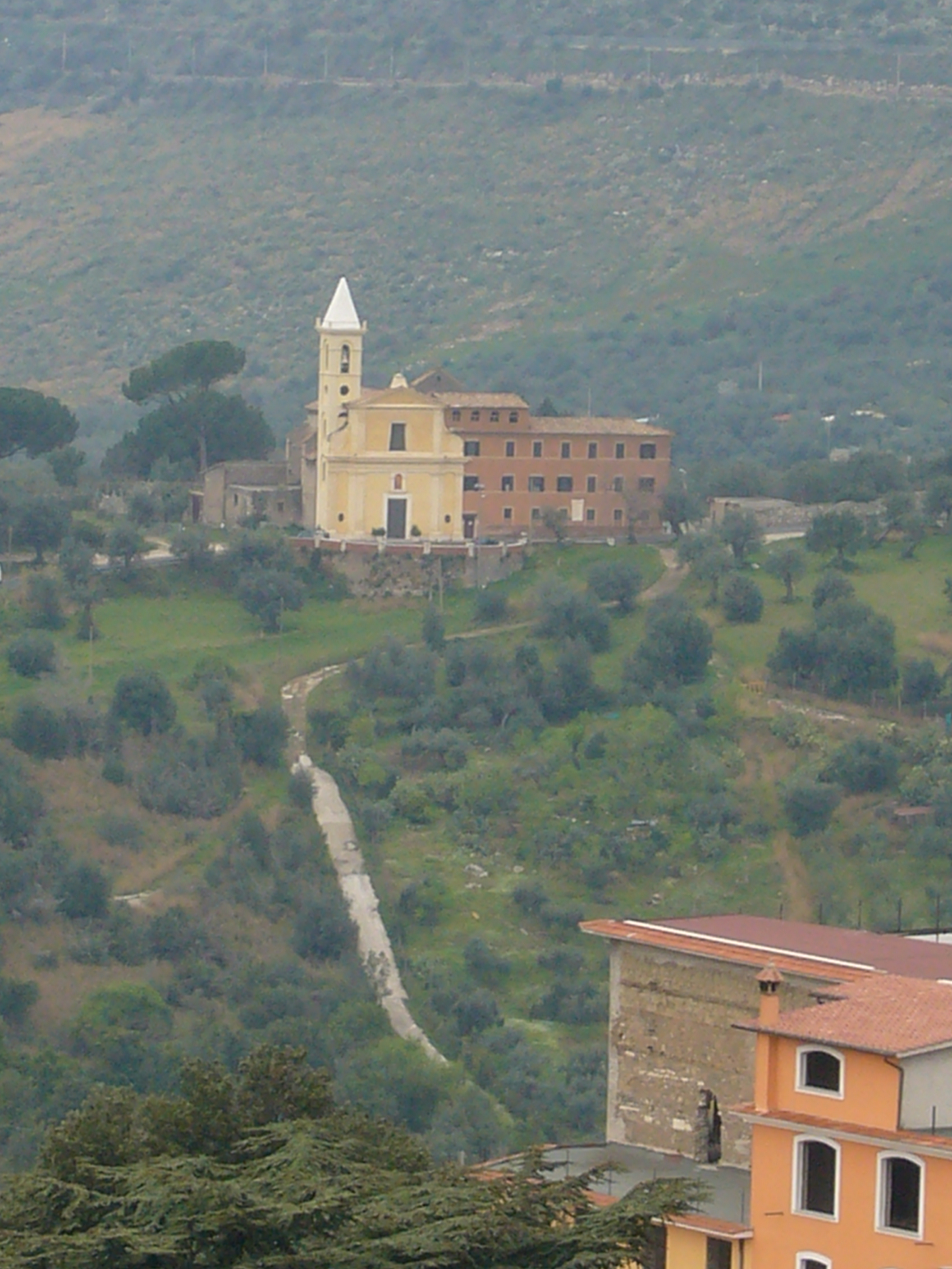 Tivoli, chiesa e convento della Madonna di Quintiliolo